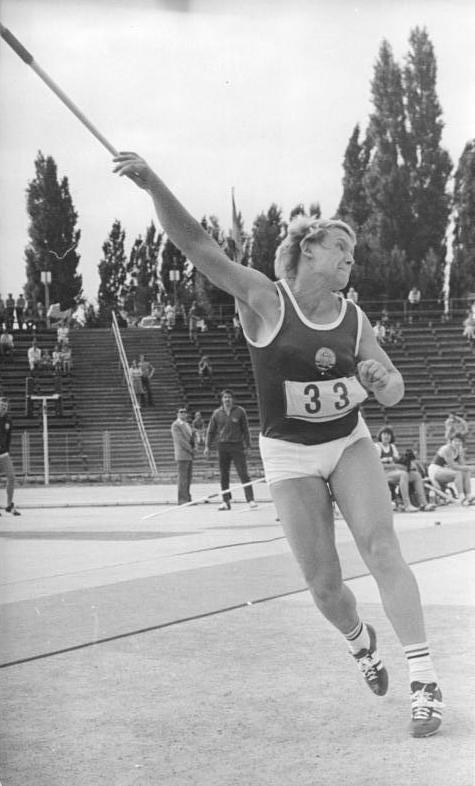 Ruth Fuchs ADN-ZB Stark 10.7.1976 Berlin: Weltrekord durch Ruth Fuchs-Mit der Weite von 69,12 m verbesserte Ruth Fuchs (DDR) am 10.07. beim DVfL-Sportfest im Berliner Jahn-Sportpark ihren eigenen Weltrekord im Speerwerfen um Fast zwei Meter. Ihre alte Bestleistung aus dem Jahre 1974 stand bei 67,22m.